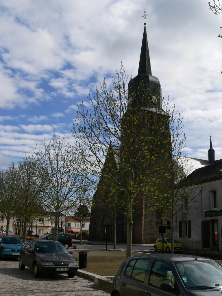 Le May-sur-Èvre - Église